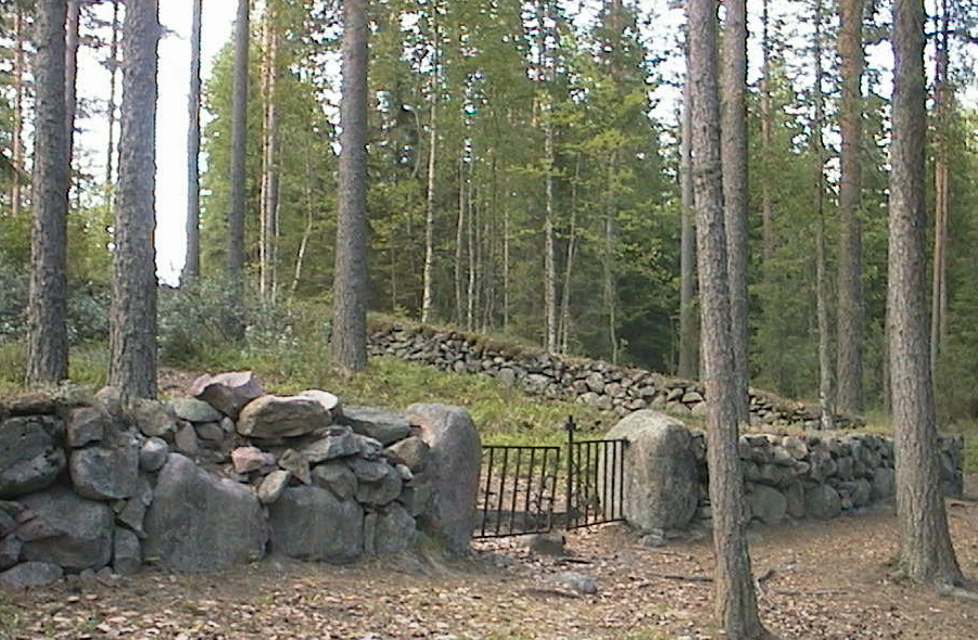 Röykän Sääksjärvellä oleva yksityinen hauta.